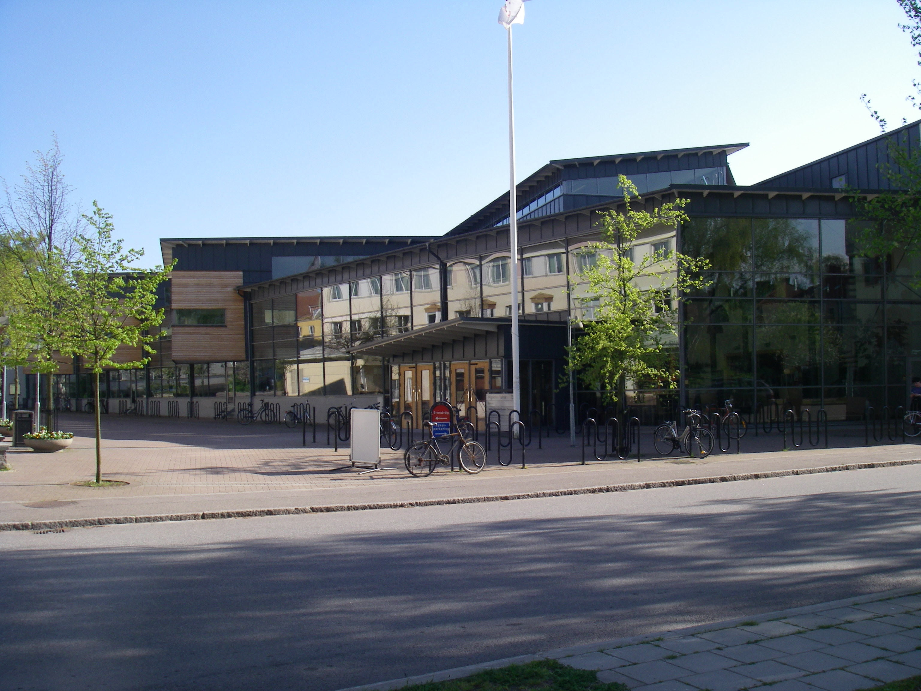 Kalmar university library